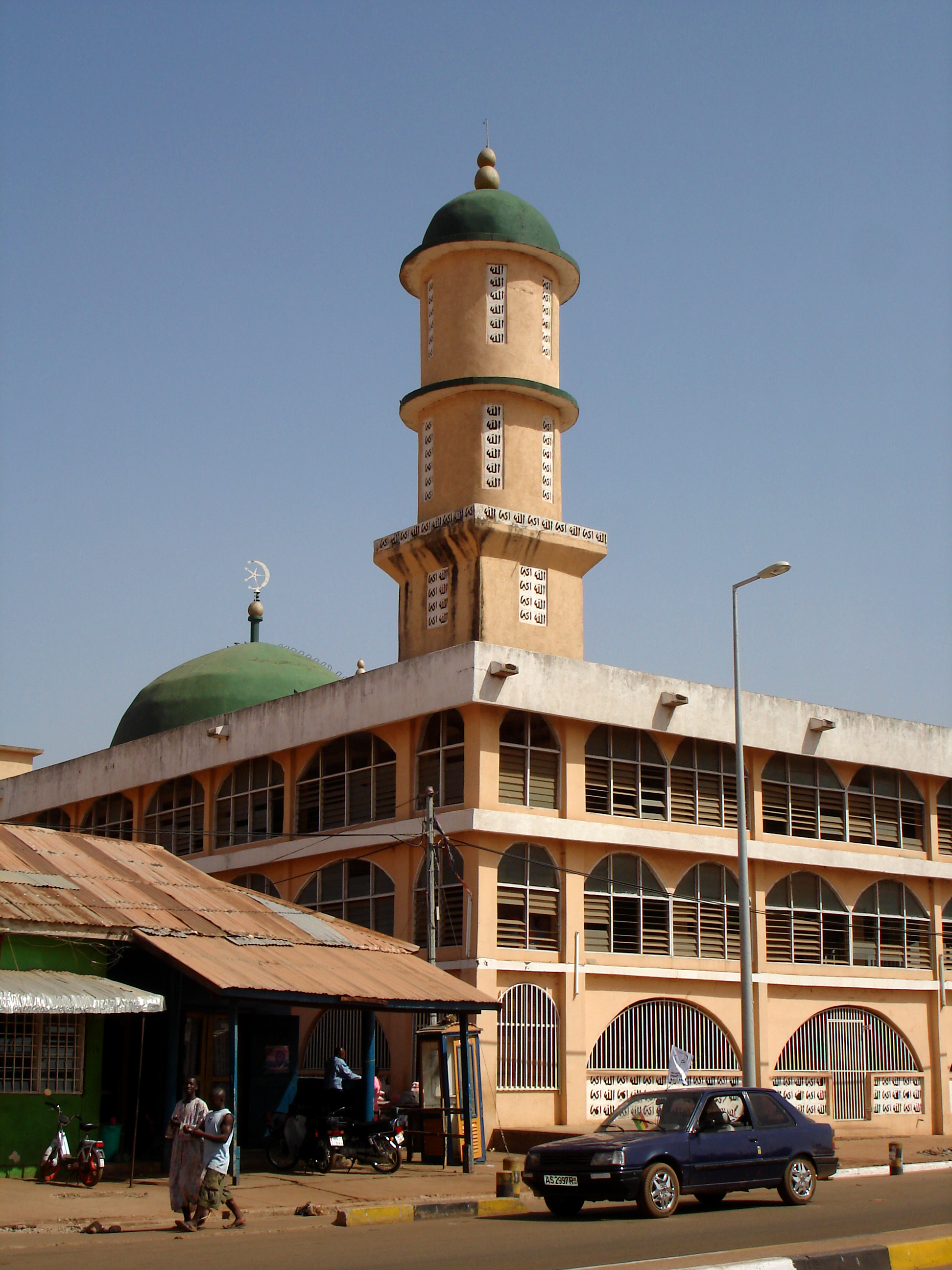 mosque in tamale, ghana